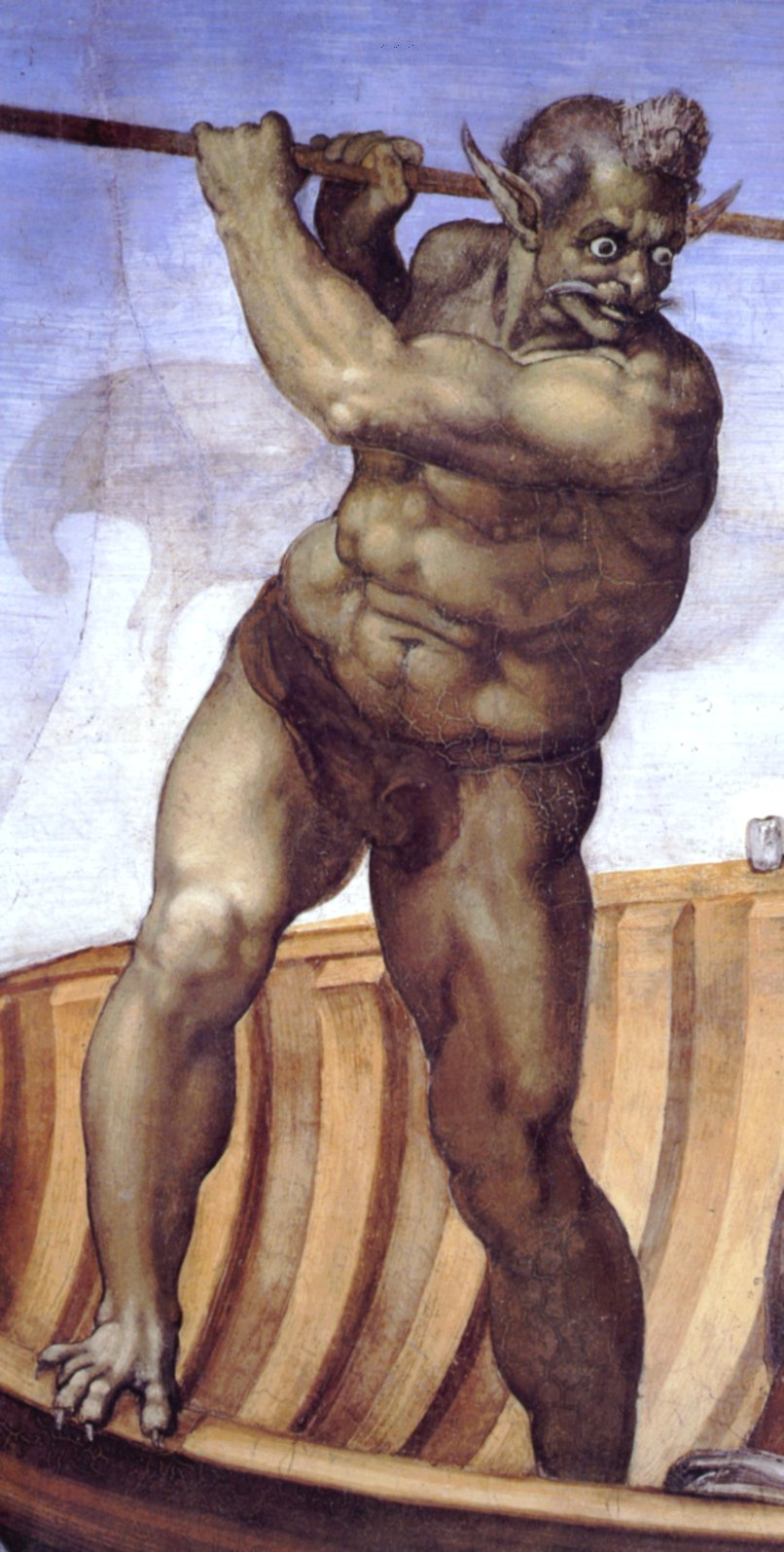 Michelangelo: Charon treibt die Verdammten aus seinem Boot in die Hölle, Fresco, Vatikan, 1536-41 (Ausschnitt des Jüngsten Gerichts)